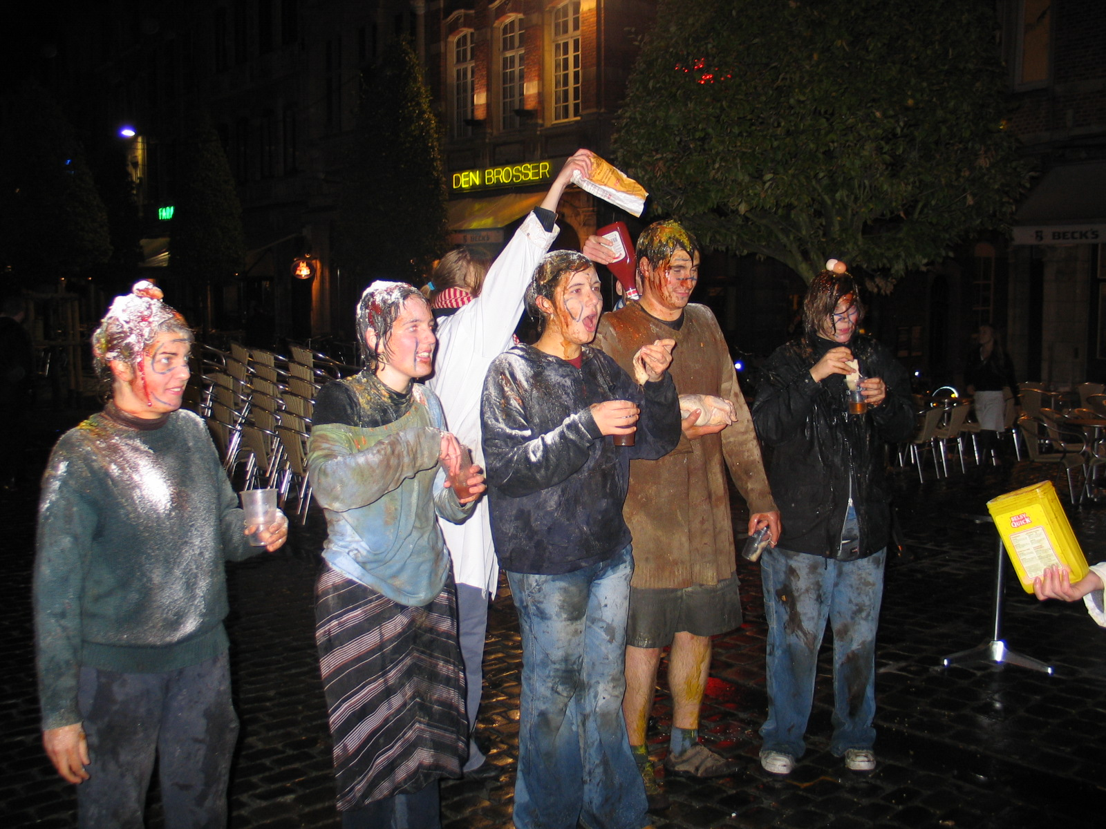 studentendoop in Leuven - eigen foto